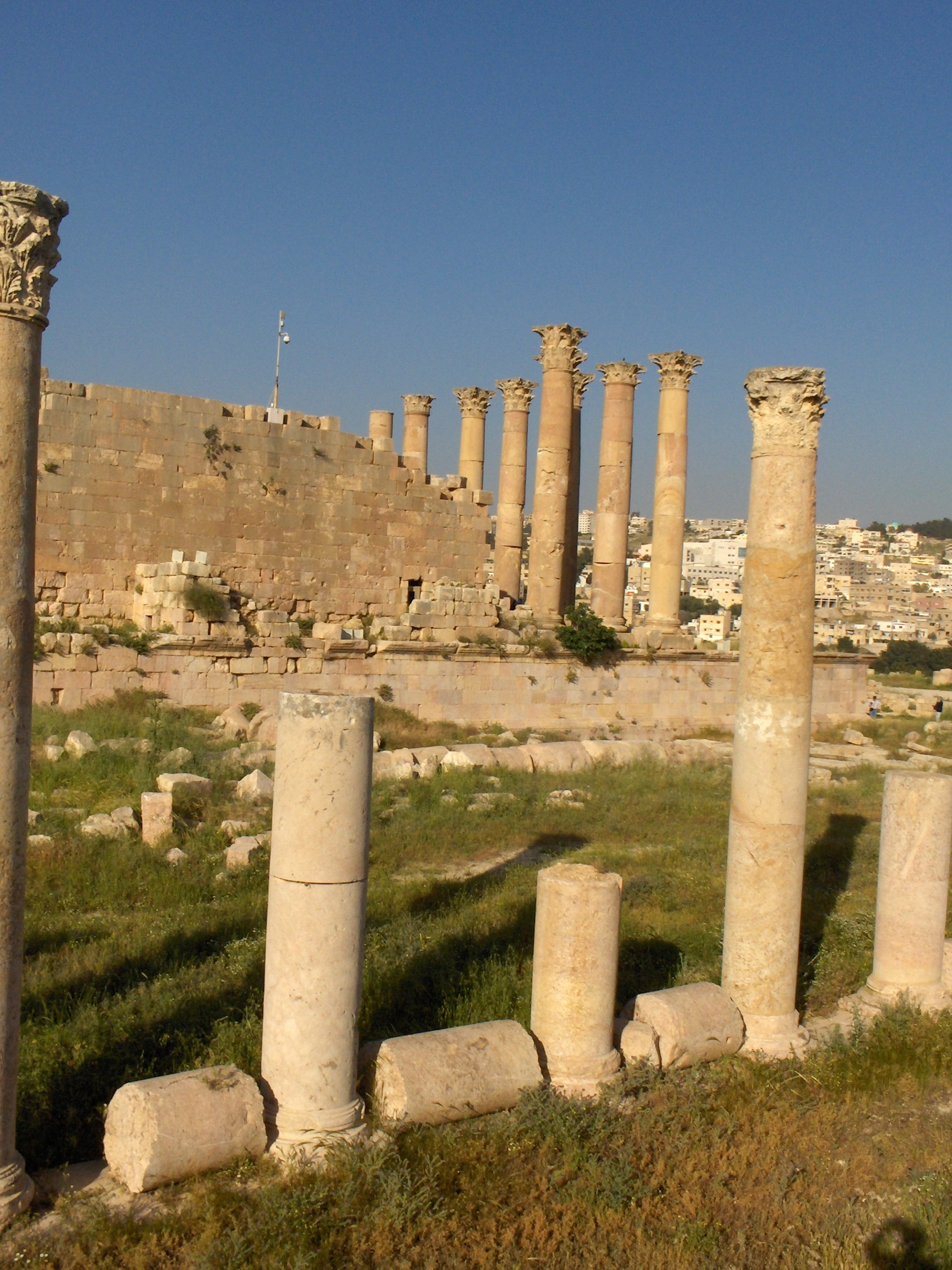 La cattedrale di Jerash, Giordania